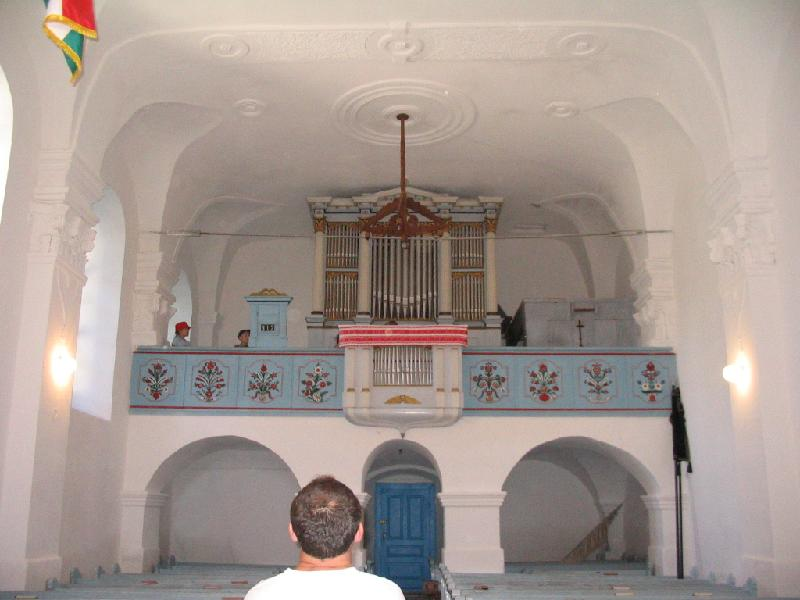 Felsőrákosi unitárius templom belseje